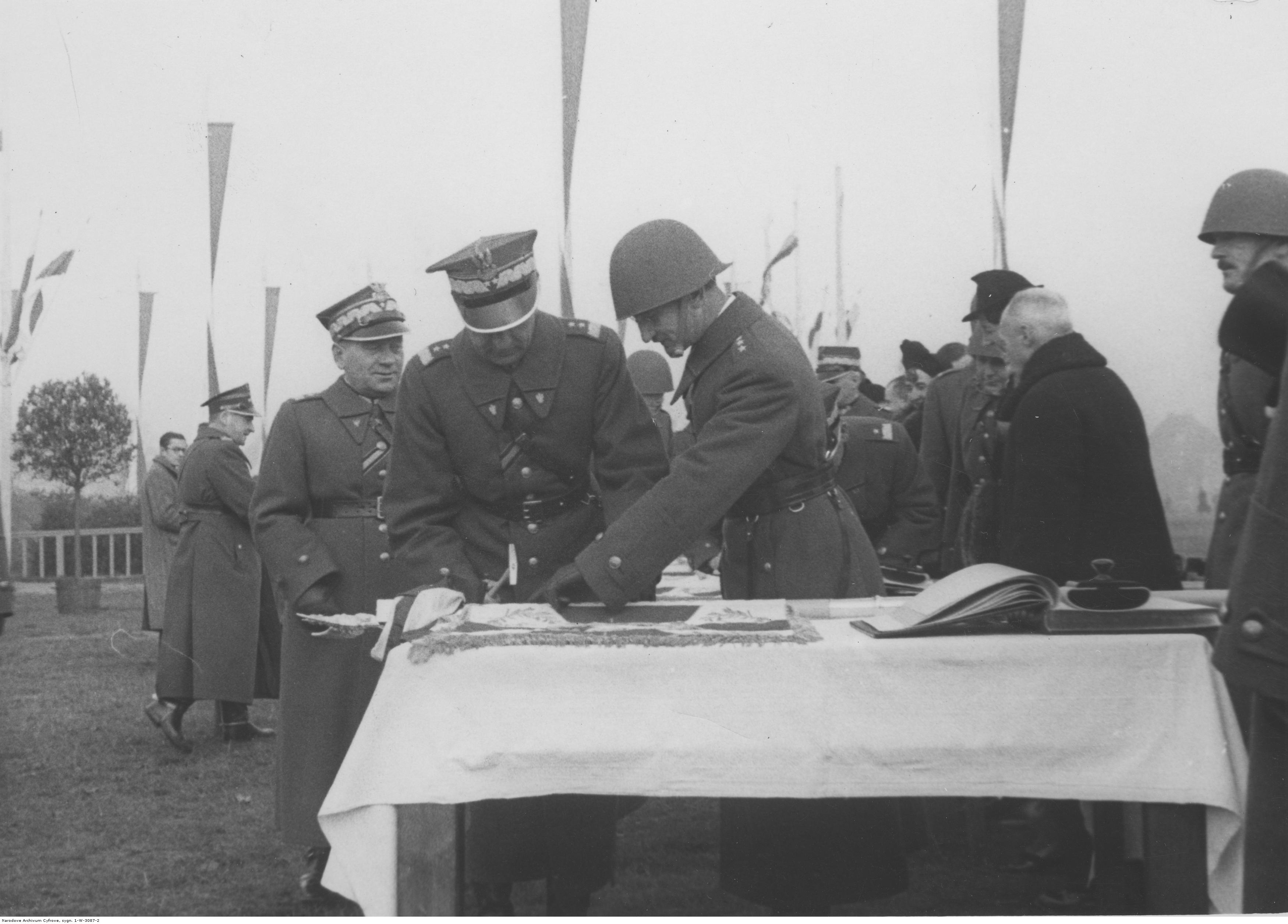 Wręczenie sztandarów artylerii przeciwlotniczej; listopad 1938. Gen. Tadeusz Kasprzycki wbija gwóźdź w drzewce sztandaru; za nim gen. Mieczysław Trojanowski. Koncern Ilustrowany Kurier Codzienny - Archiwum Ilustracji. Sygnatura: 1-W-3087-2